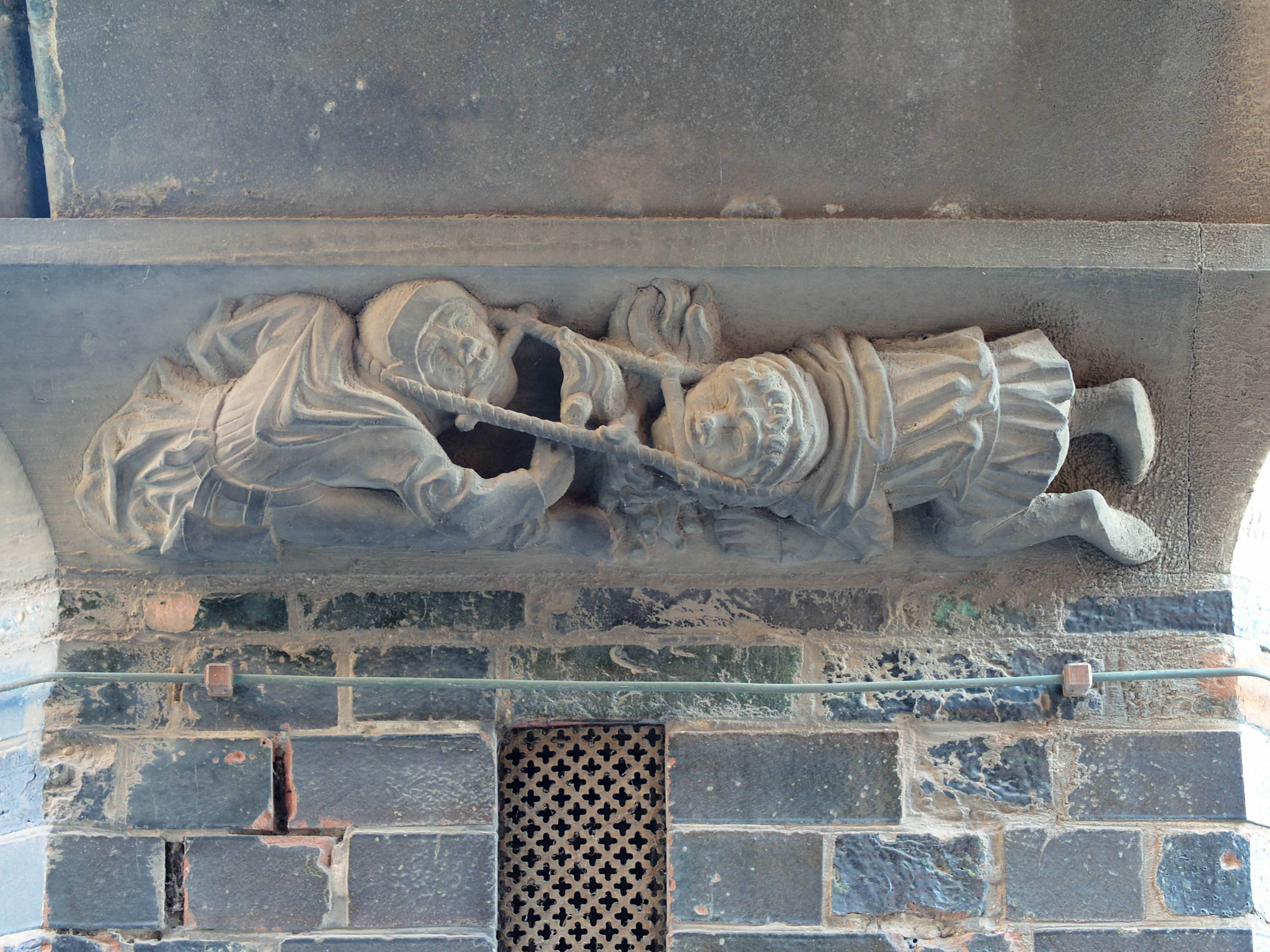 Relief am Lübecker Rathaus im Durchgang von der Breiten Straße zum Marienkirchhof, Strebkatzenziehen darstellend